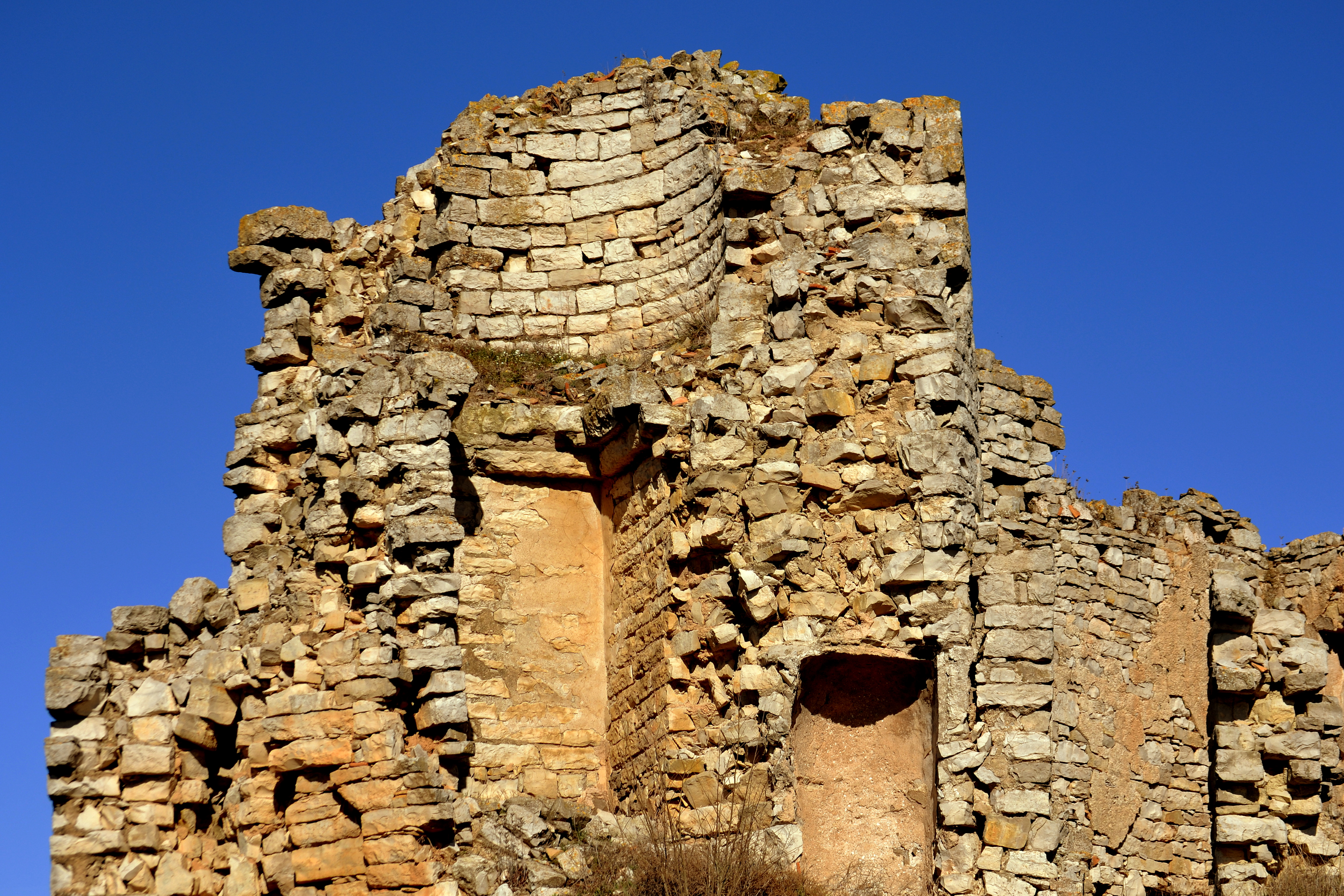 Castell d'Alta-riba (Estaràs)